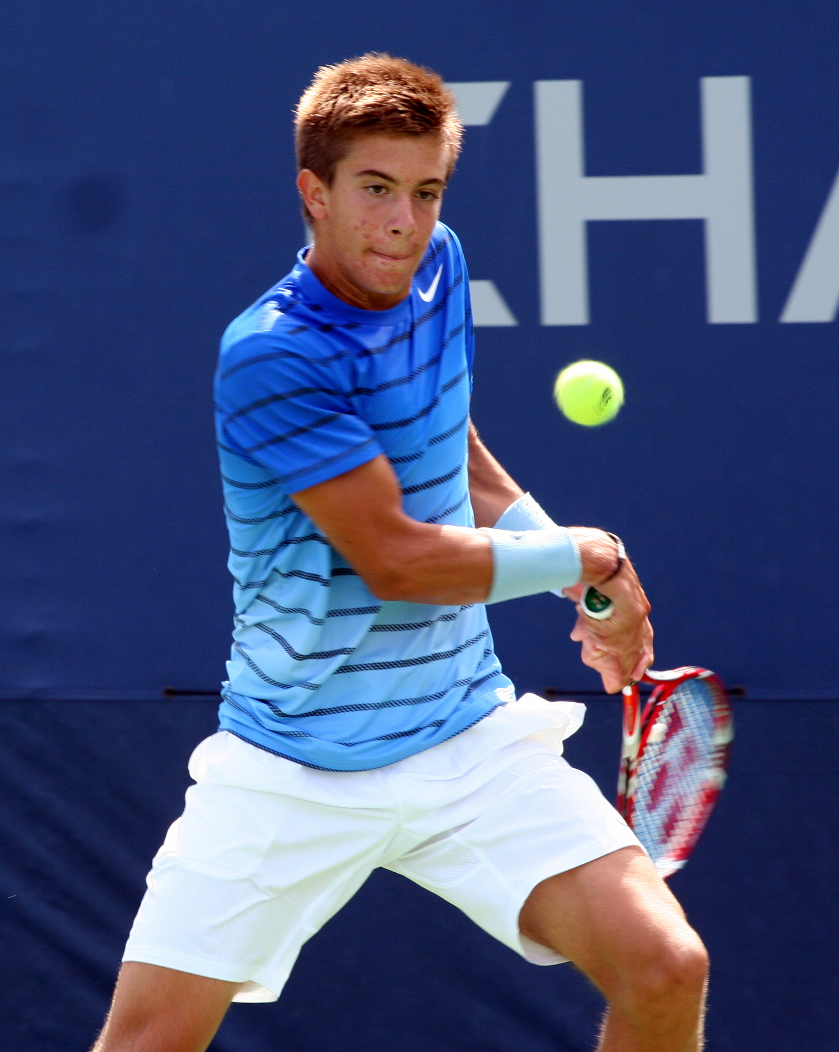 Хорватський тенісист Борна Чорич, переможець Відкритого чемпіонату США 2013 серед юніорів.